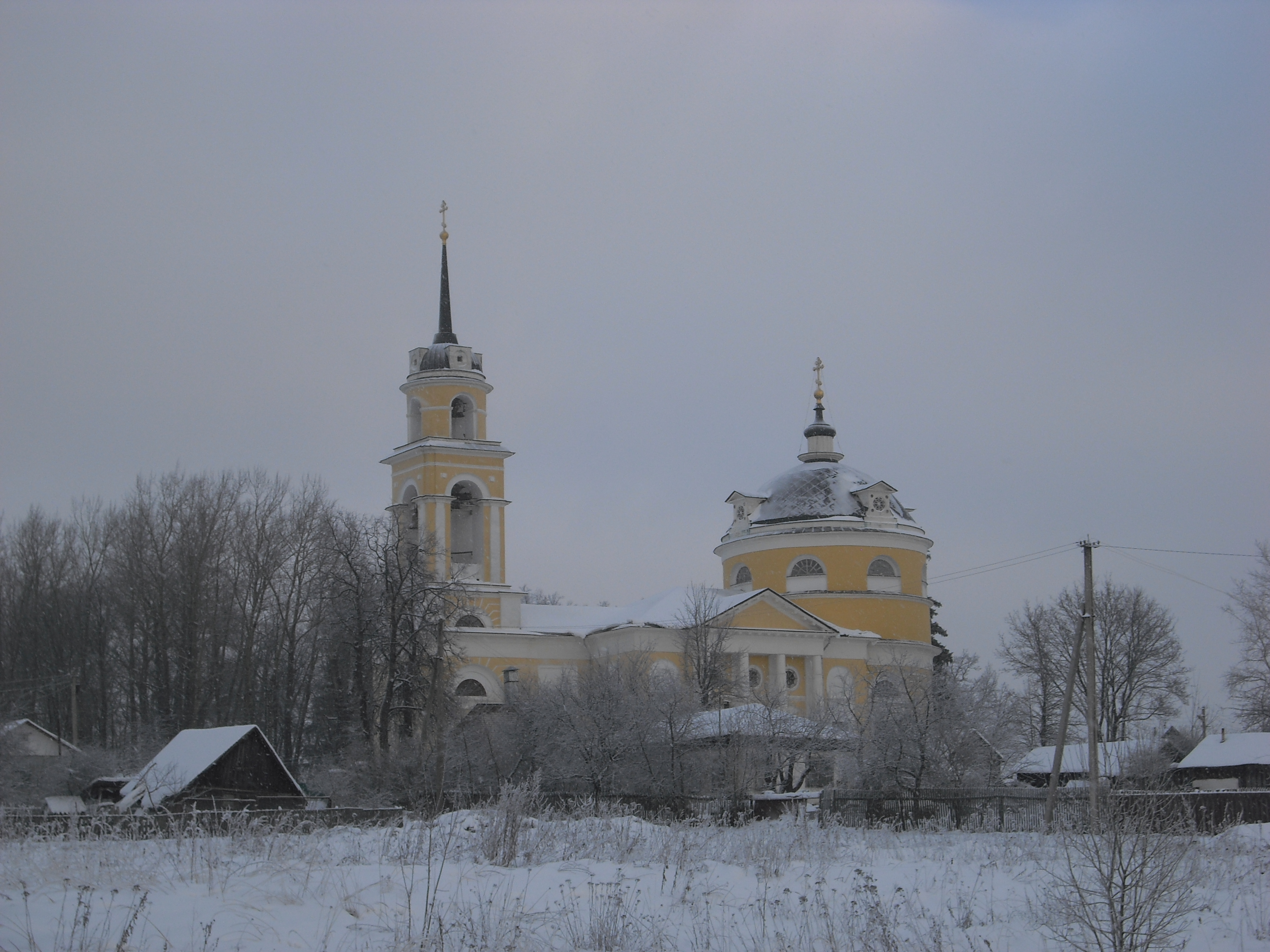 Покровская цервовь в селе Андреевское Дмитровского района Московской области, Россия